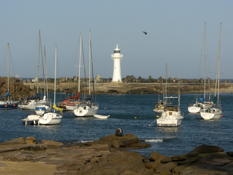 Uitsig oor Wollongong hawe met die Wollongong Breakwater vuurtoring in die agtergrond.